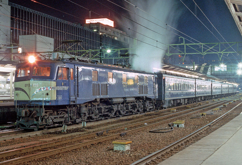 国鉄EF58 150けん引宮原客車区スロ81系お座敷客車